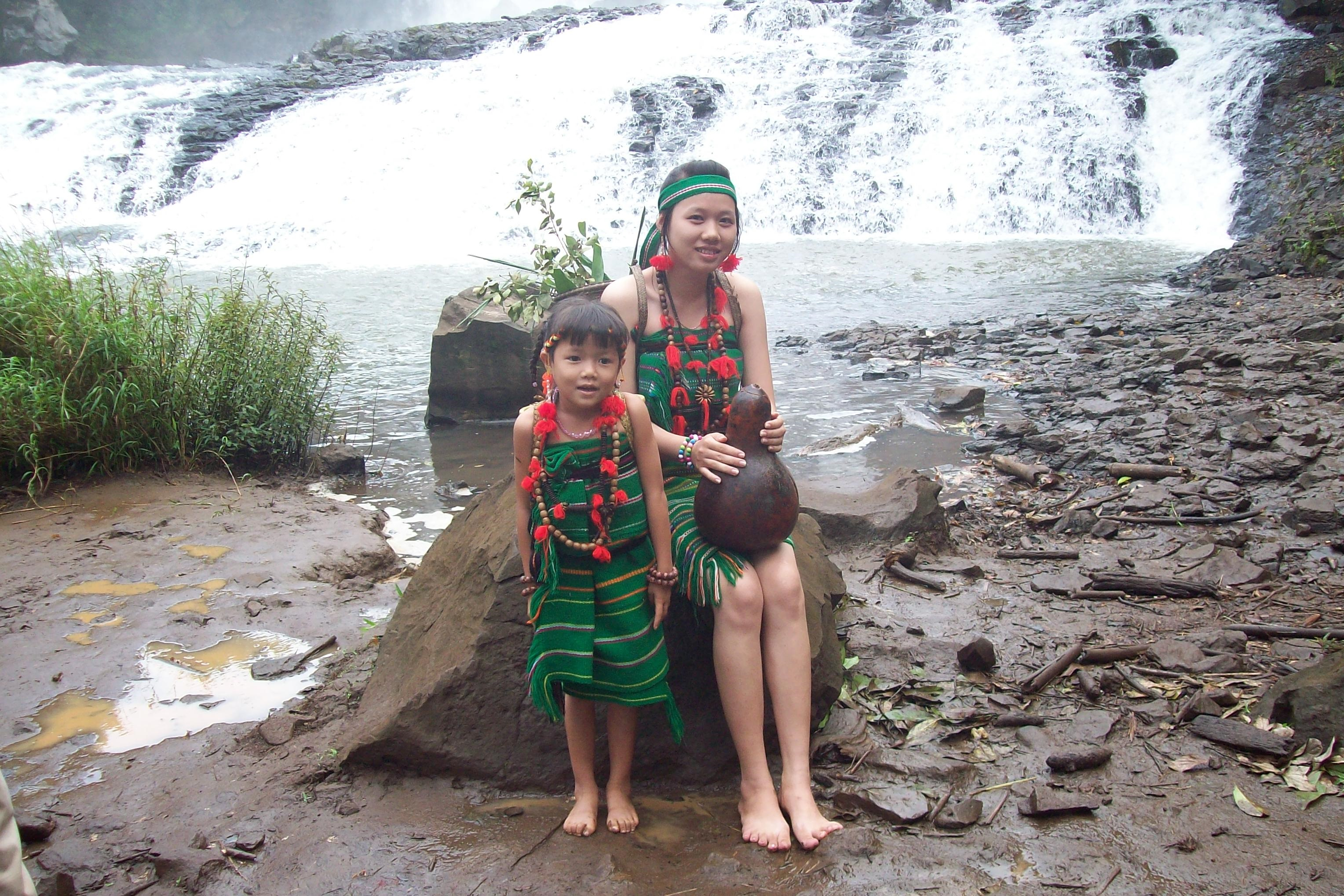 Mujer y joven con trajes tradicionales de la etnía Phnom